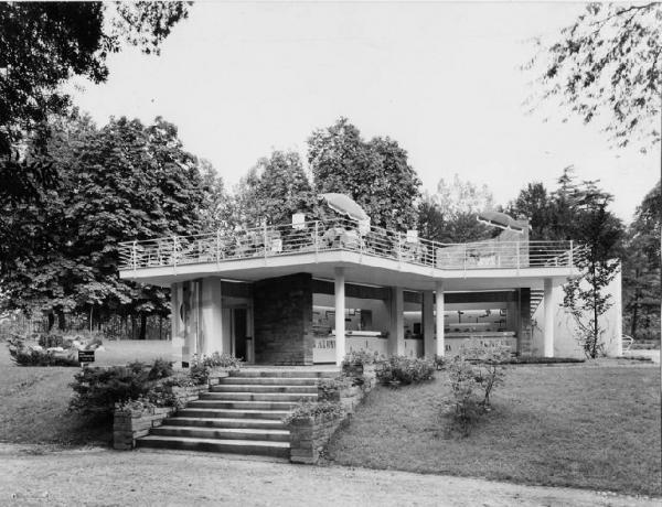 Milano, il Bar Bianco all’interno del Parco Sempione, costruito in occasione della X Triennale (1954) su progetto di Riccardo Griffini per conto della Centrale del Latte.